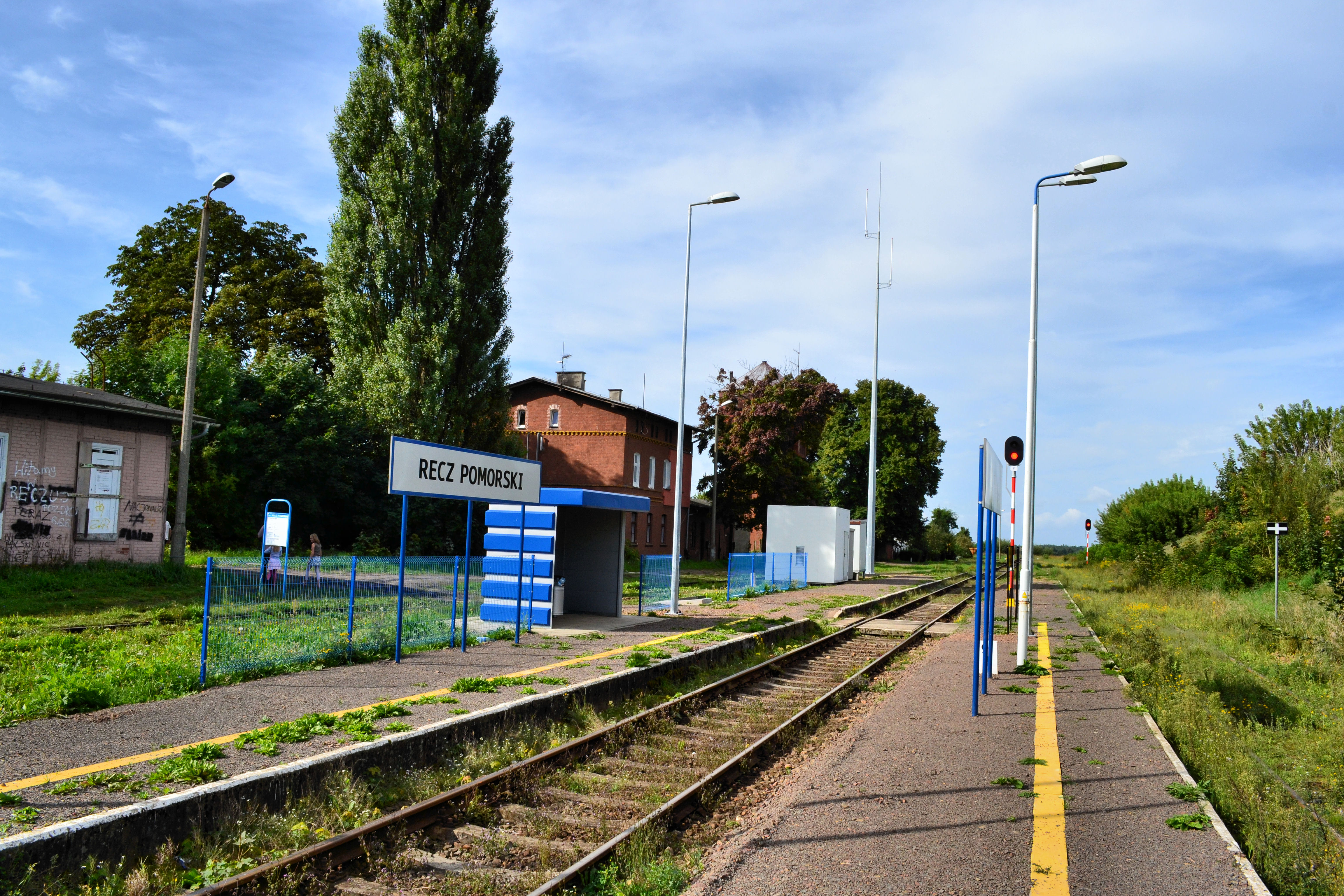 Przystanek kolejowy w Reczu Pomorskim (stan po modernizacji linii w 2012 r.)